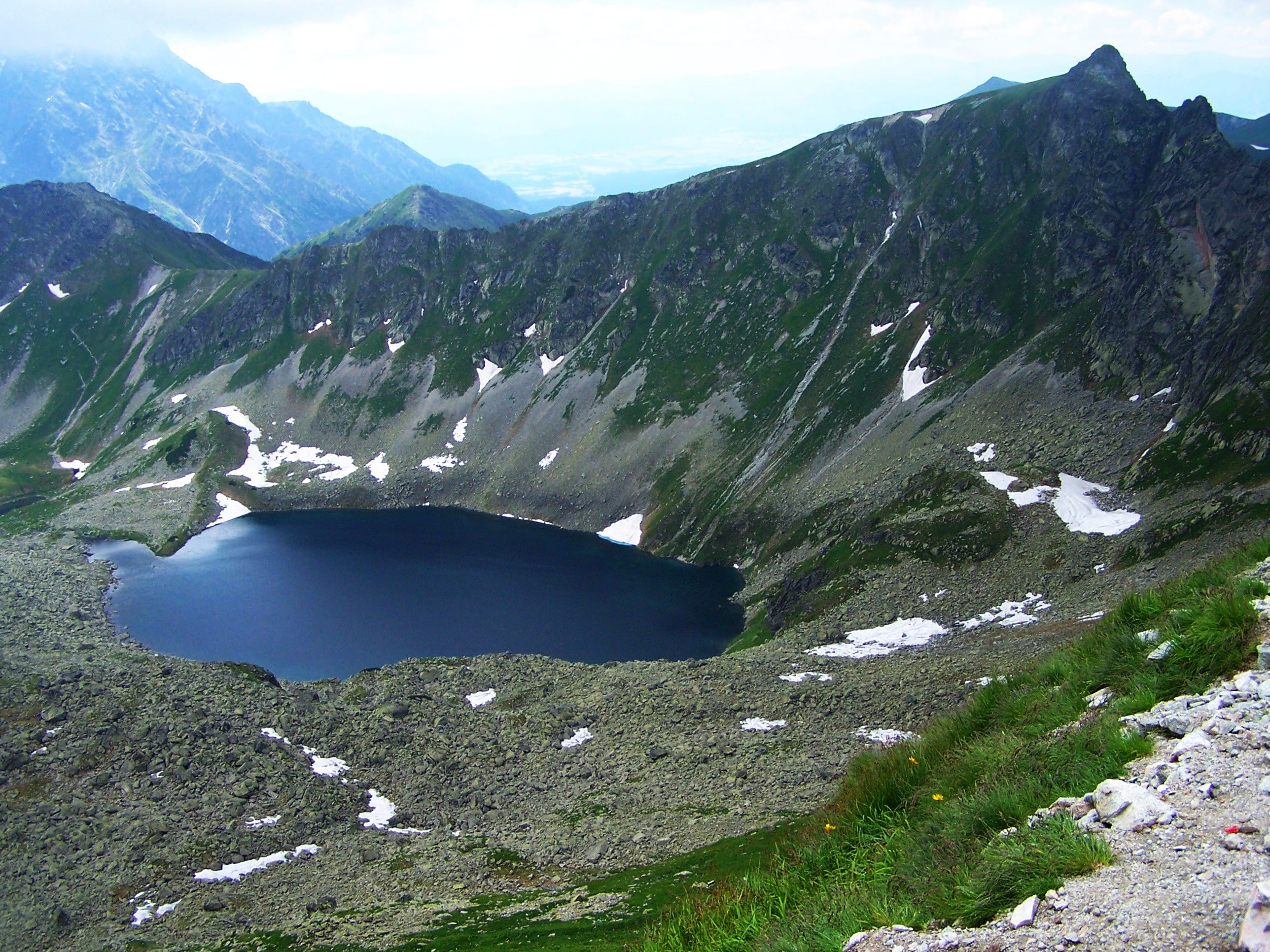 Zadni Staw Polski (Dolina 5 Stawów Polskich)